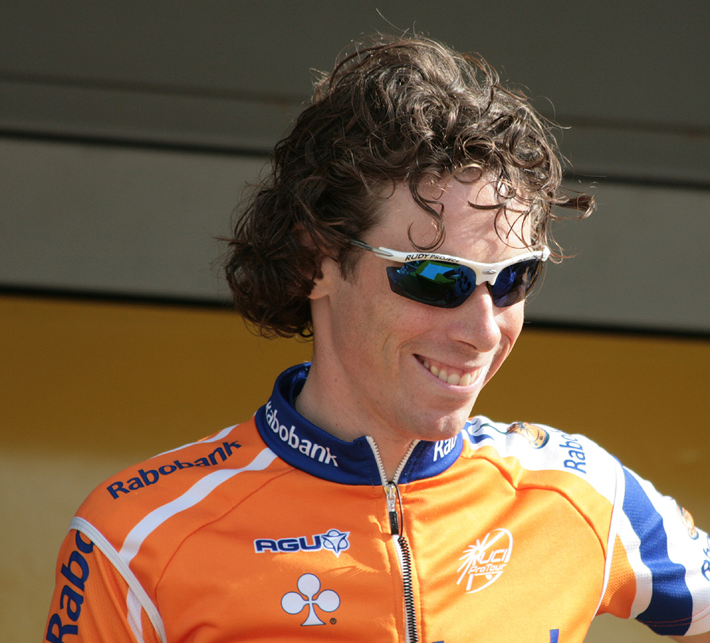 L. ten Dam voor Luik-Bastenaken-Luik 2008